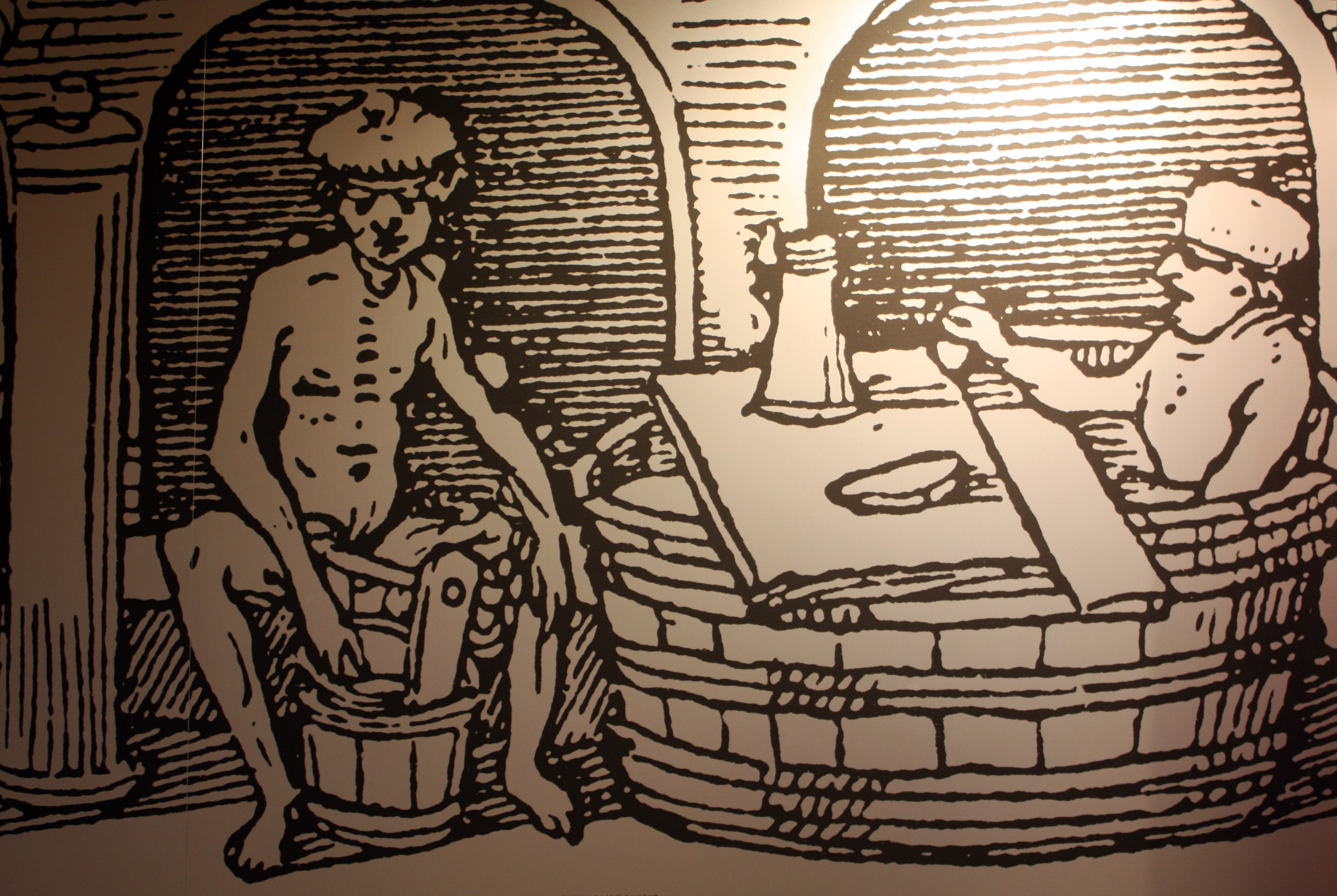 Museum der Badekultur, Zülpich. Darstellung einer Badeszene, Holzschnitt 1533